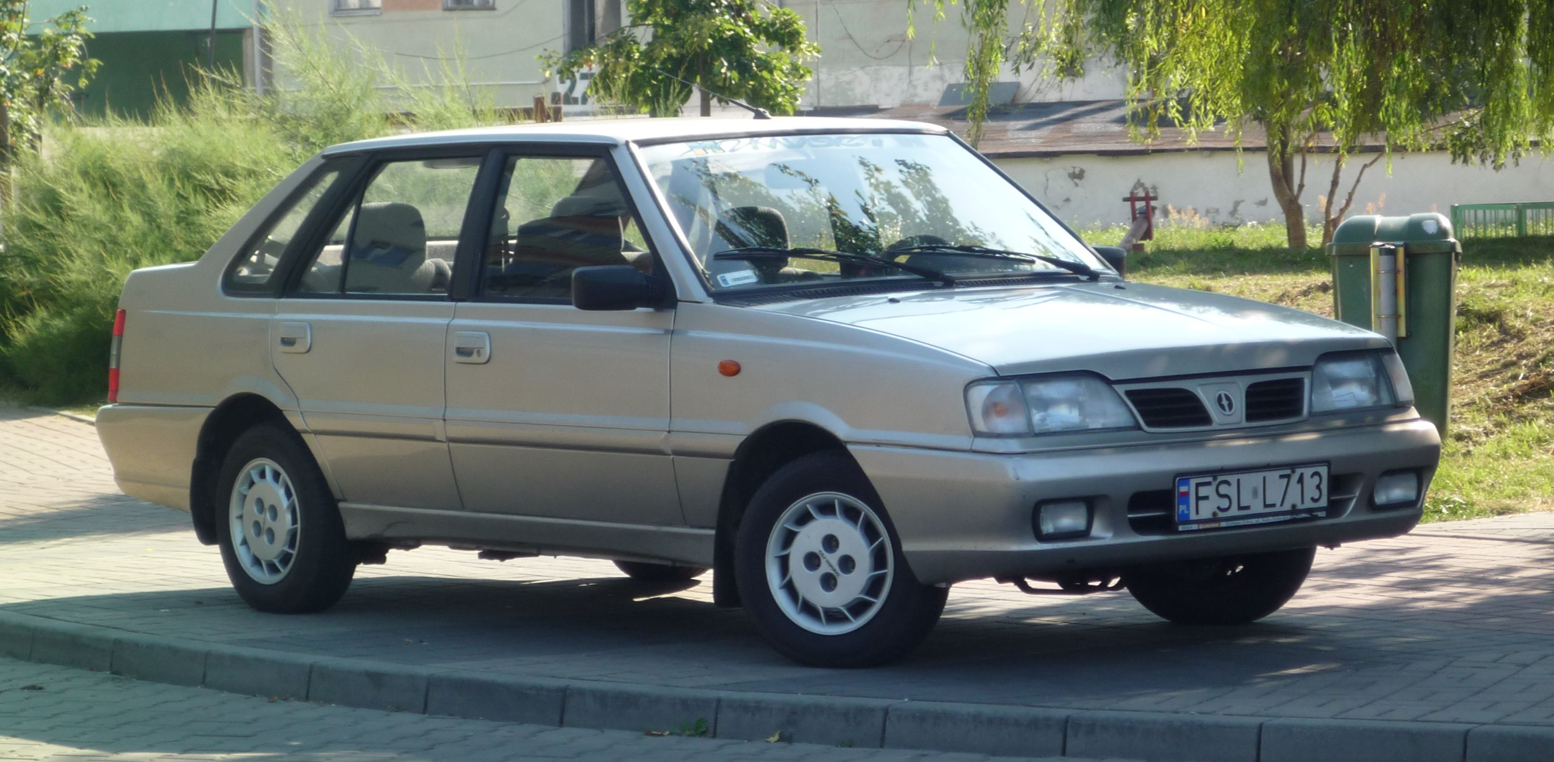 Daewoo-FSO Polonez Atu Plus 1.6 GSI w Słubicach.